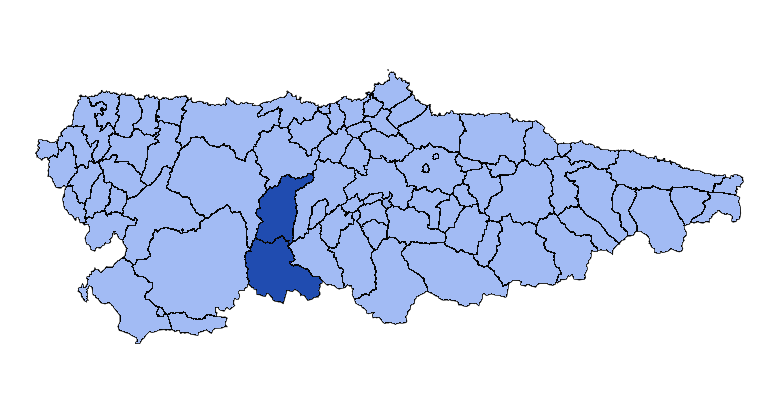 Concejos que forman la mancomunidad asturiana Valle del Pigüeña